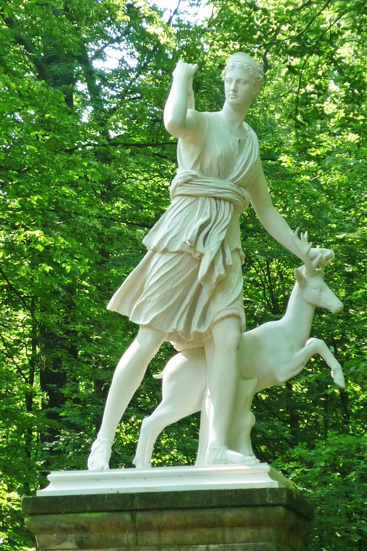 Dianatempel im Schlosspark Dittersbach